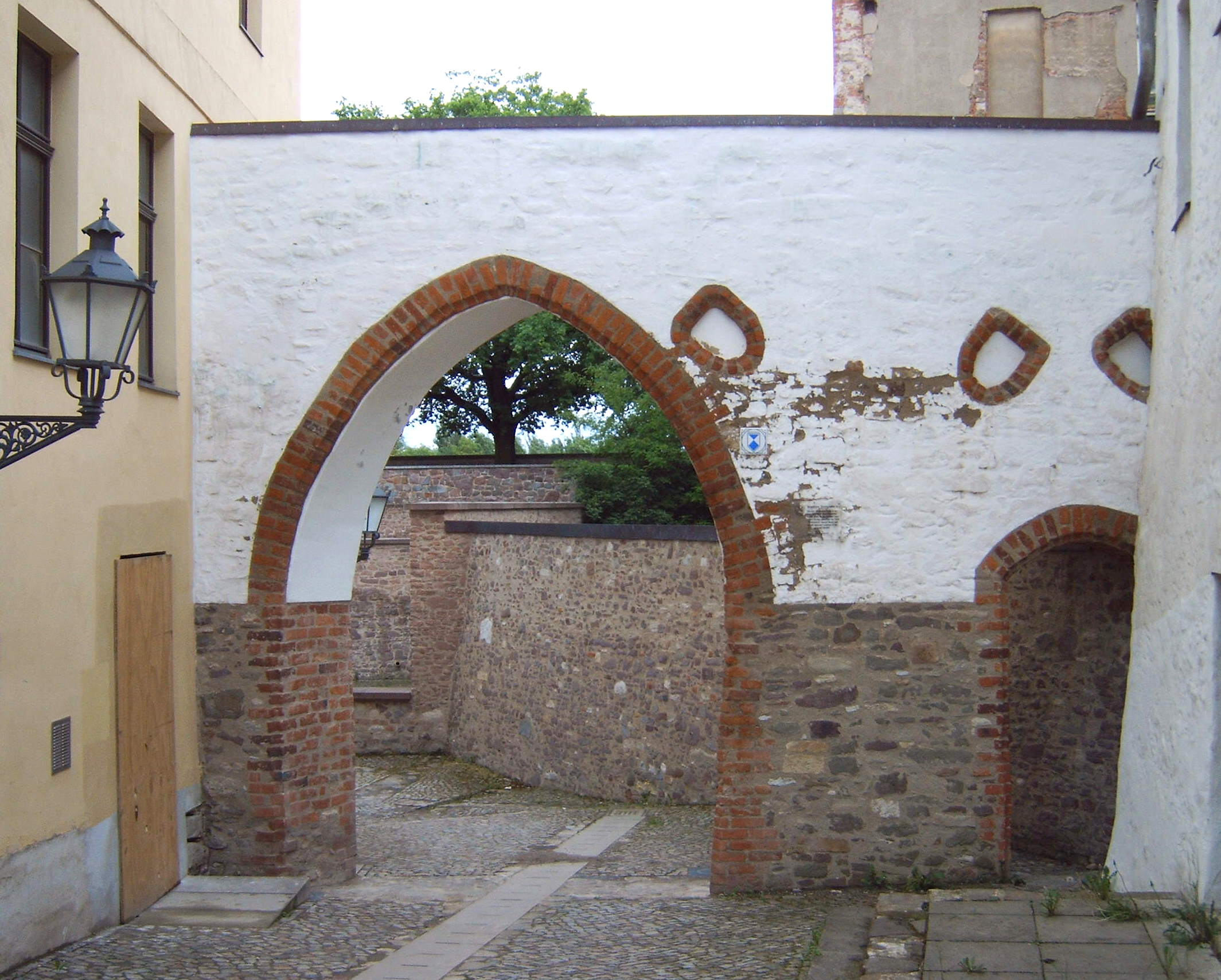 Stadttor in Magdeburg, nähe Dom, Westseite des Tors